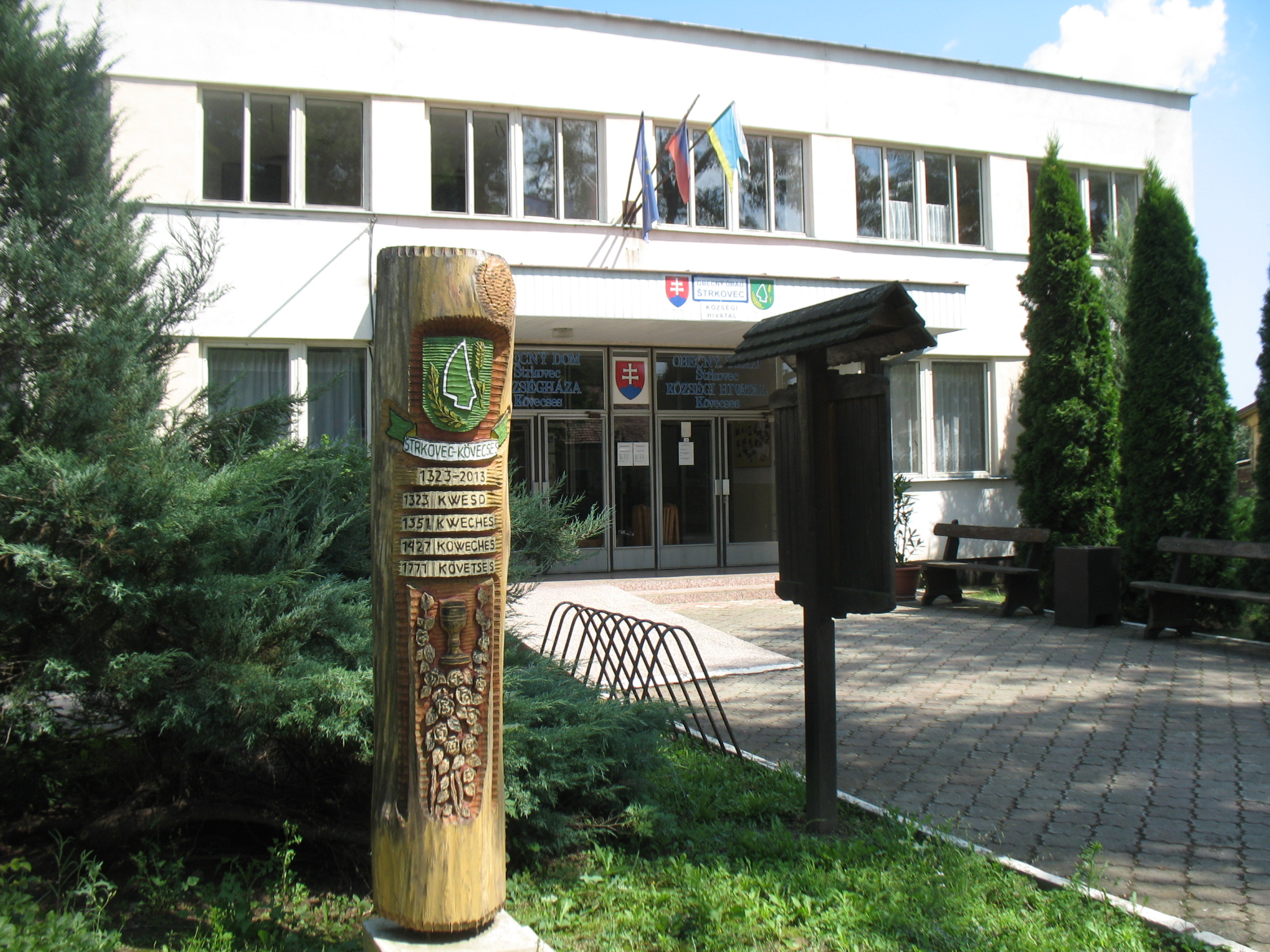 Kövecses